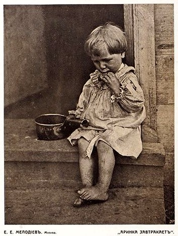 Є.Є.Мелодієв Аринка снідає.